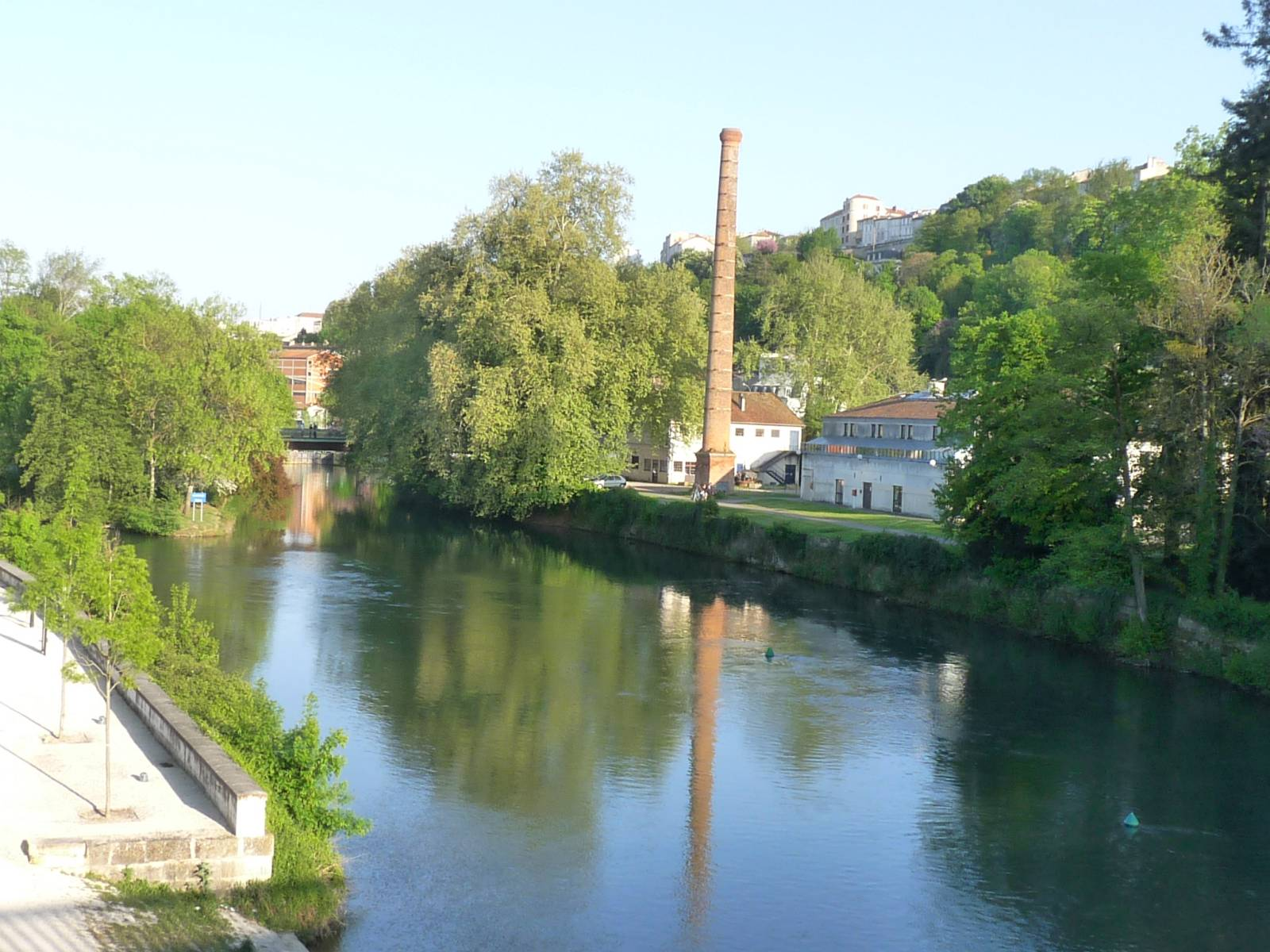 La Charente vue du pont de Saintes à Angoulême, France; école des Beaux arts et musée du papier à droite